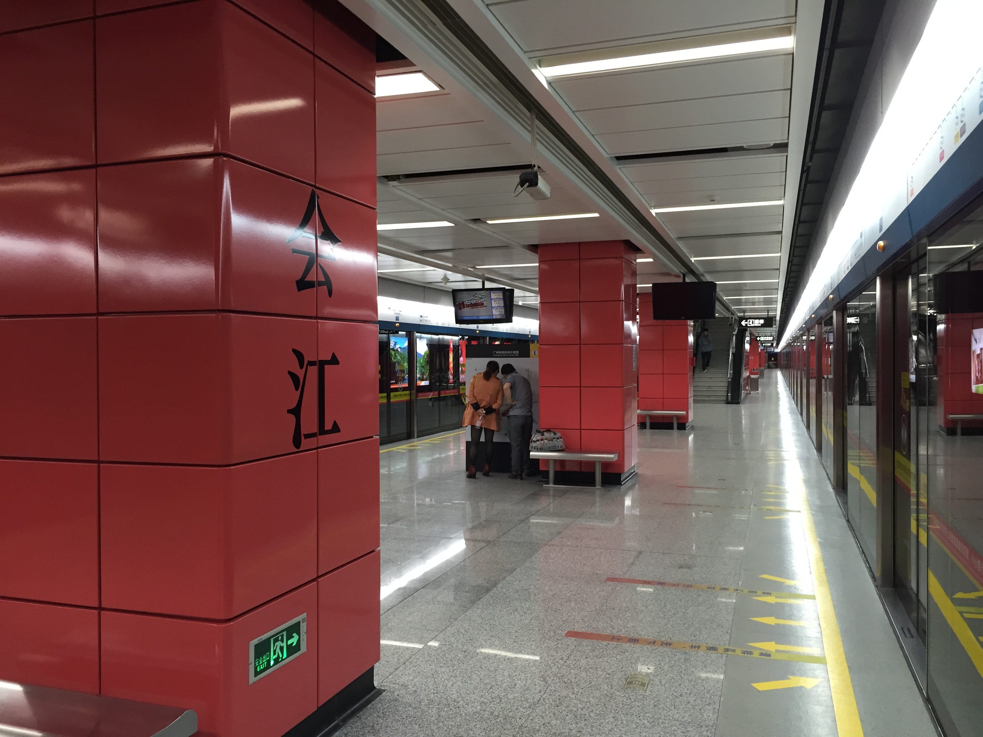 广州地铁会江站